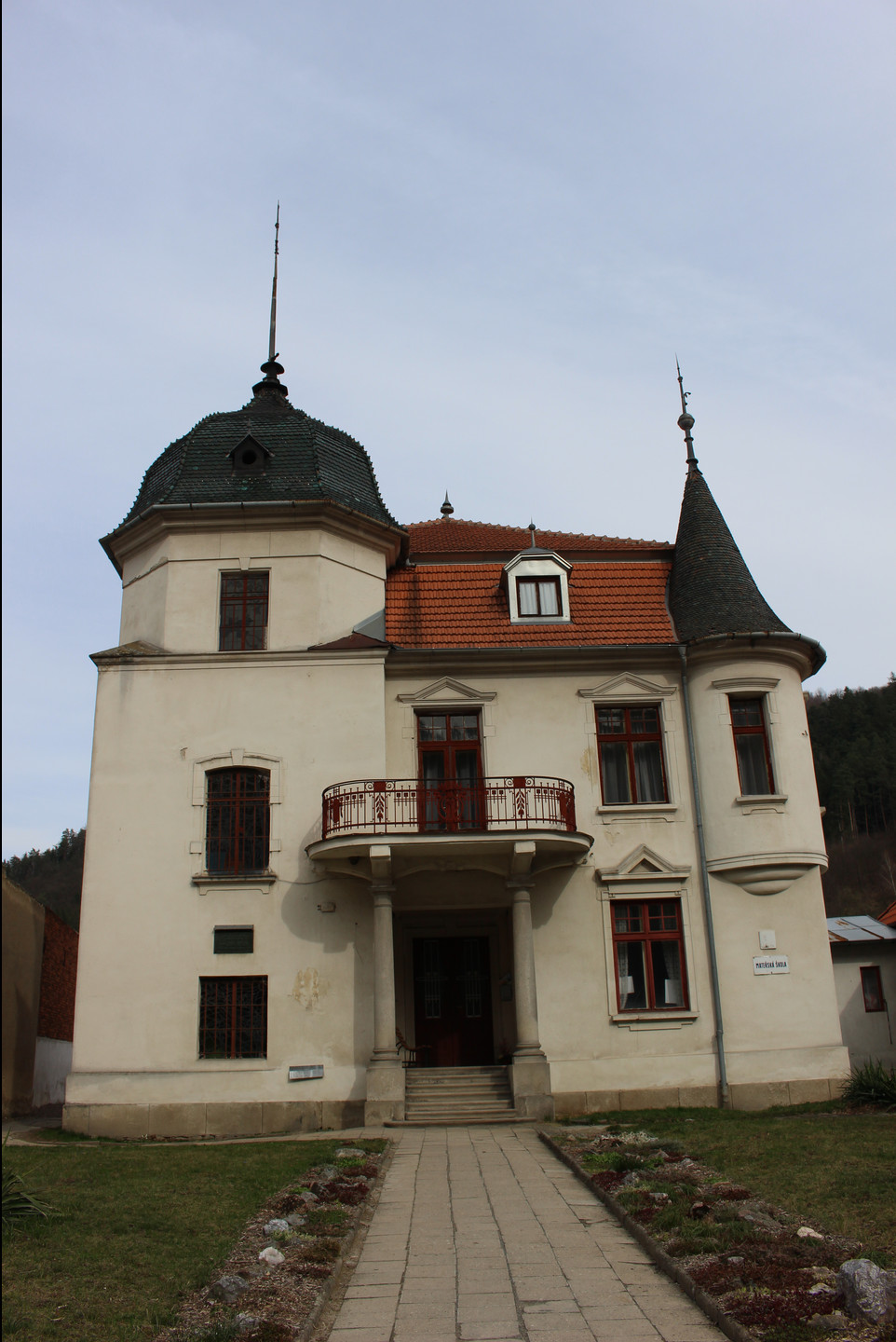 Koldova vila (akademik Jan Kolda), obec Doubravník čp. 9, okres Brno-venkov, Jihomoravský kraj